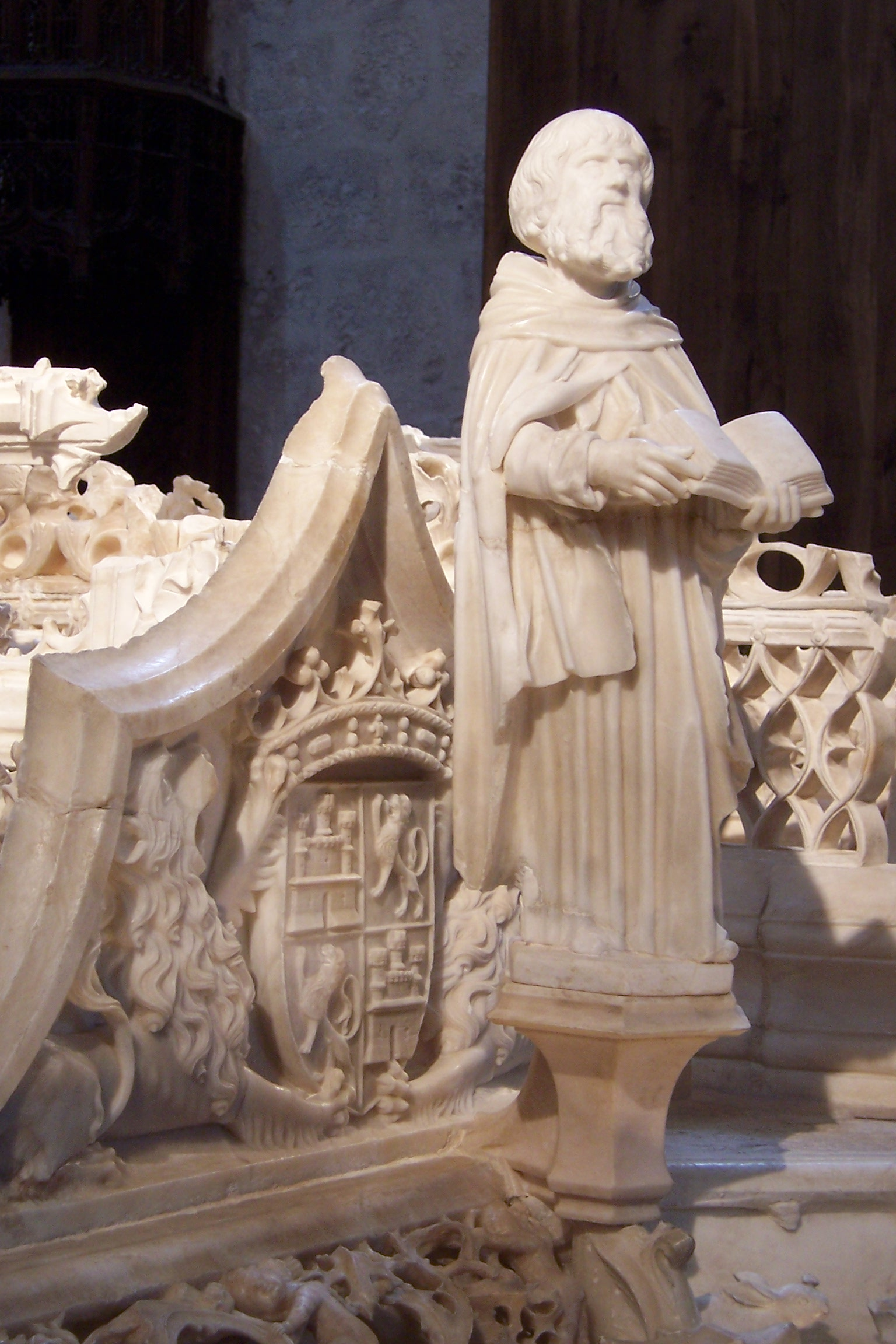 Cartuja de Miraflores (Burgos, España). Detalle de los sepulcros de Juan II e Isabel de Portugal, obra del escultor Gil de Siloé. Se encuentran delante dela altar mayor y en el centro de la nave de la iglesia.